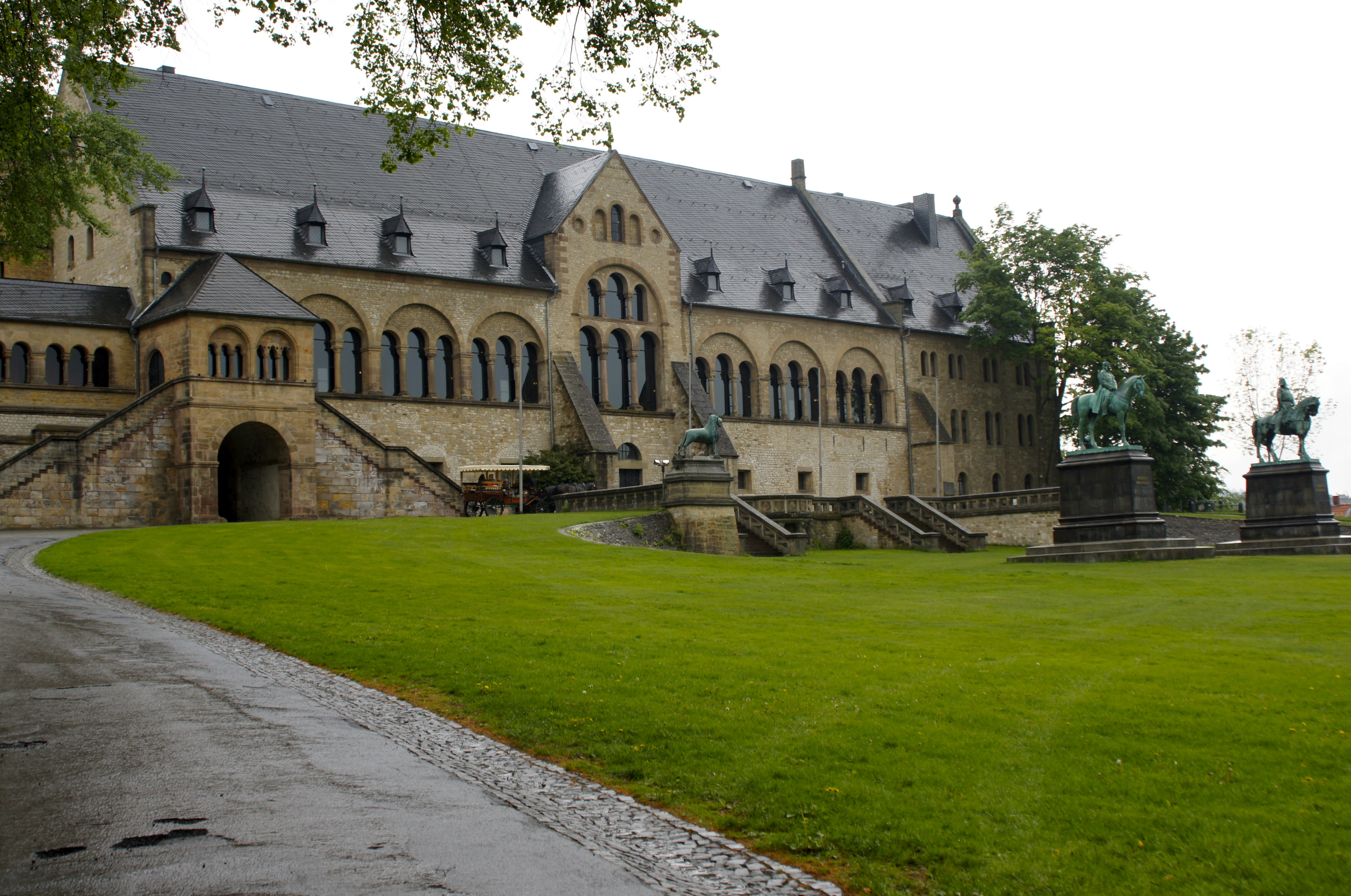 Der Palas der ehemaligen Kaiserpfalz Goslar auf dem Rammelsberg in Goslar (Harz). Die Anlage wurde bereits 1005(?) unter Heinrich II begonnen und Ende 1050 unter Heinrich III vollendet. Das Entstehungsdatum der links neben dem Palas stehenden Ulrichskapelle ist unbekannt. Der Palas ist 54m lang und 18m tief und damit der größte und besterhaltenste Profanbau Deutschlands aus dem 11 Jhd.